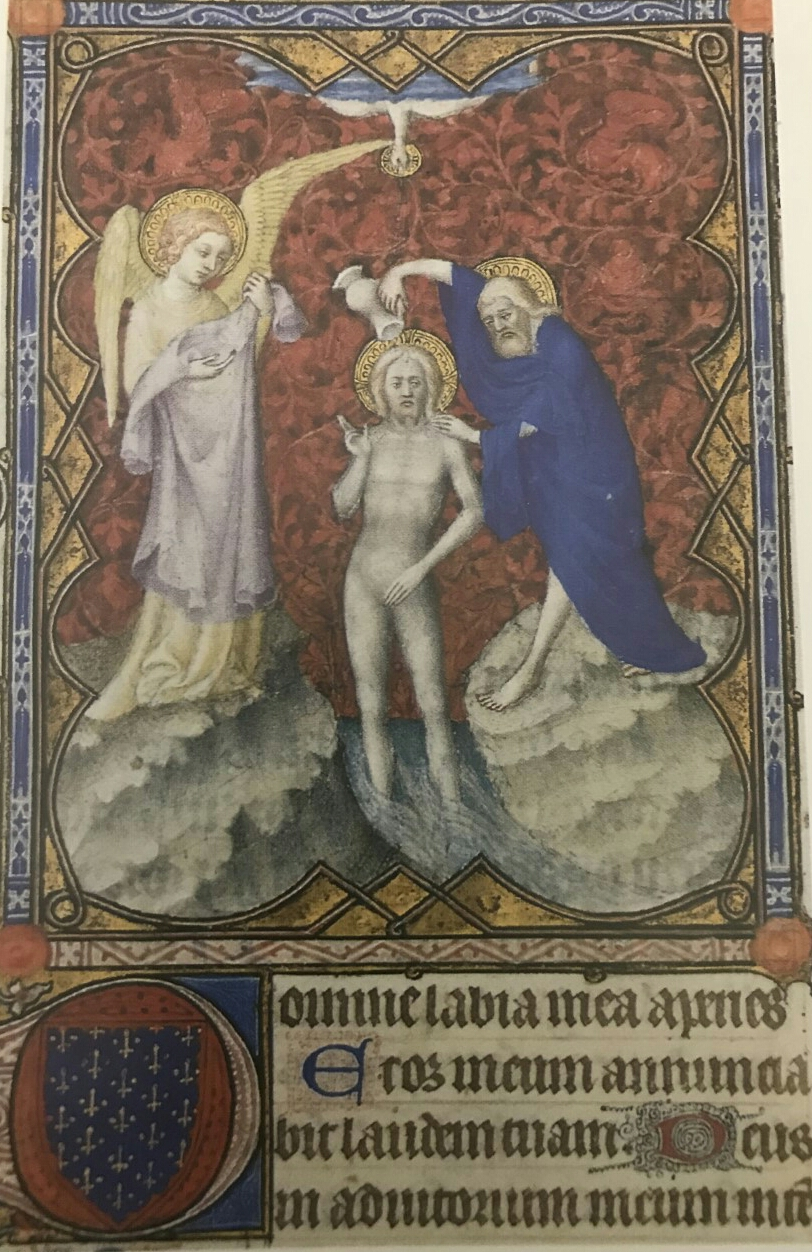 Le Baptême de Jésus, miniature des Petites Heures de Jean de Berry, par le Maître de la Trinité.